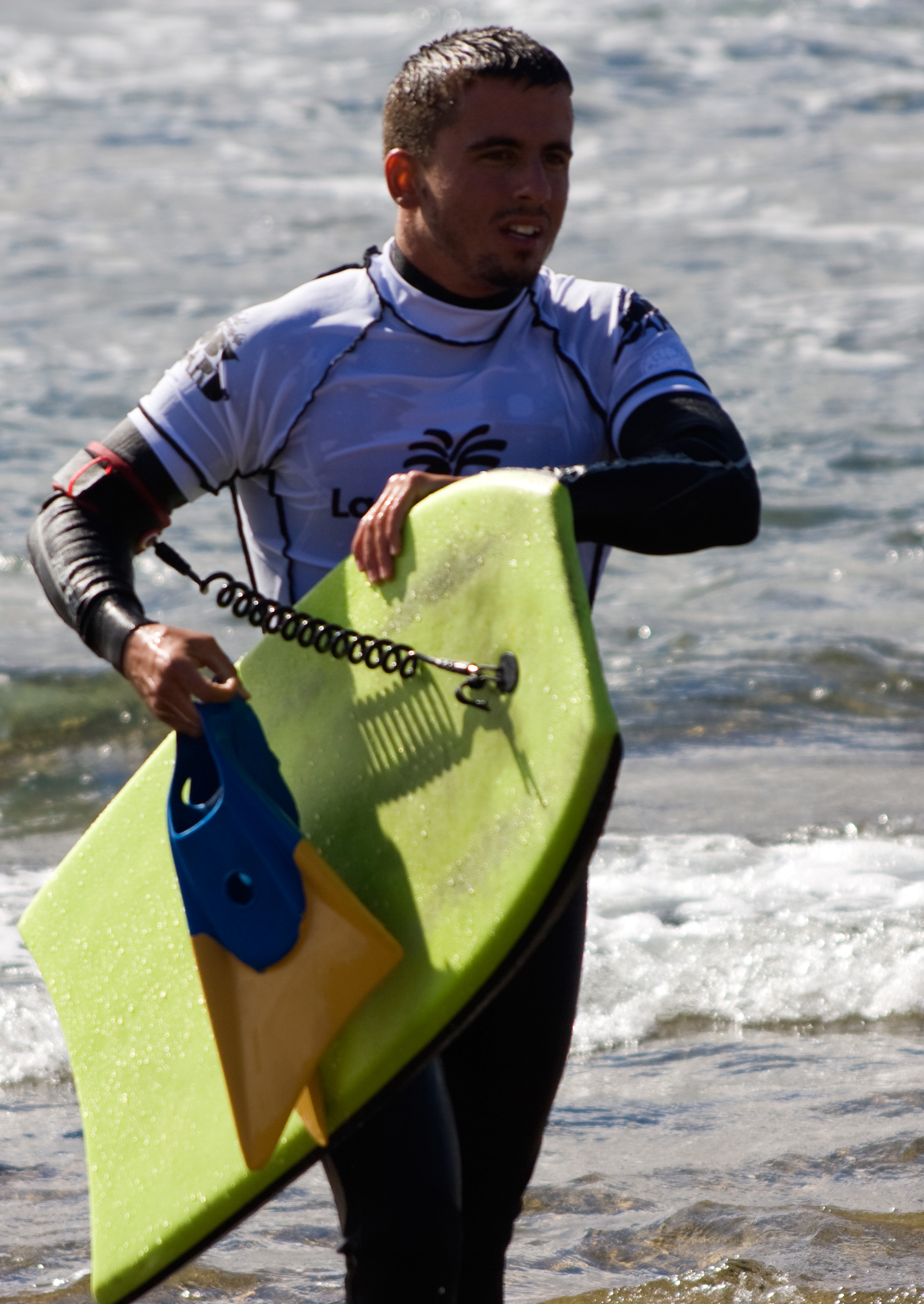 Ver mas fotografias del Campeonato aqui : Comenzó la primera jornada del Campeonato del Mundo de Bodyboard El Confital 2010. Los mejores riders del planeta volverán a deleitar en El Confital. Del 3 al 7 de diciembre, Las Palmas de Gran Canaria acoge por cuarto año consecutivo la última entrega del World Tour de la IBA (International Bodyboarding Association), competición en la que participarán numerosos campeones del mundo de la especialidad. Tras tres exitosas ediciones, la prueba grancanaria toma en esta ocasión un cariz si cabe más relevante, toda vez que en ella se decidirá quiénes son los 24 bugueros que formarán parte del nuevo circuito que la IBA implantará a partir de la próxima temporada, el Top 24 GSS (Grand Slam Series), y que el director del IBA Tour, Terry McKenna, ha señalado como "el momento definitivo que el mundo del bodyboard estaba esperando". El Top 24 GSS será el mejor circuito que jamás se haya disputado dentro del bodyboard, con grandes privilegios mediáticos y publicitarios para los deportistas que lo conformen. Y todo se decidirá, sobre la mejor derecha de Europa, en la bahía de El Confital, donde además de Diego Cabrera y Yeray Martínez (actuales números 5 y 15 del ranking mundial), los canarios Guillermo Cobo, Airam Cabrera, Ardiel Jiménez u Óliver Herrera cuentan con serias opciones de entrar en ese histórico Top 24 si cuajan una buena actuación en El Confital. Más información en